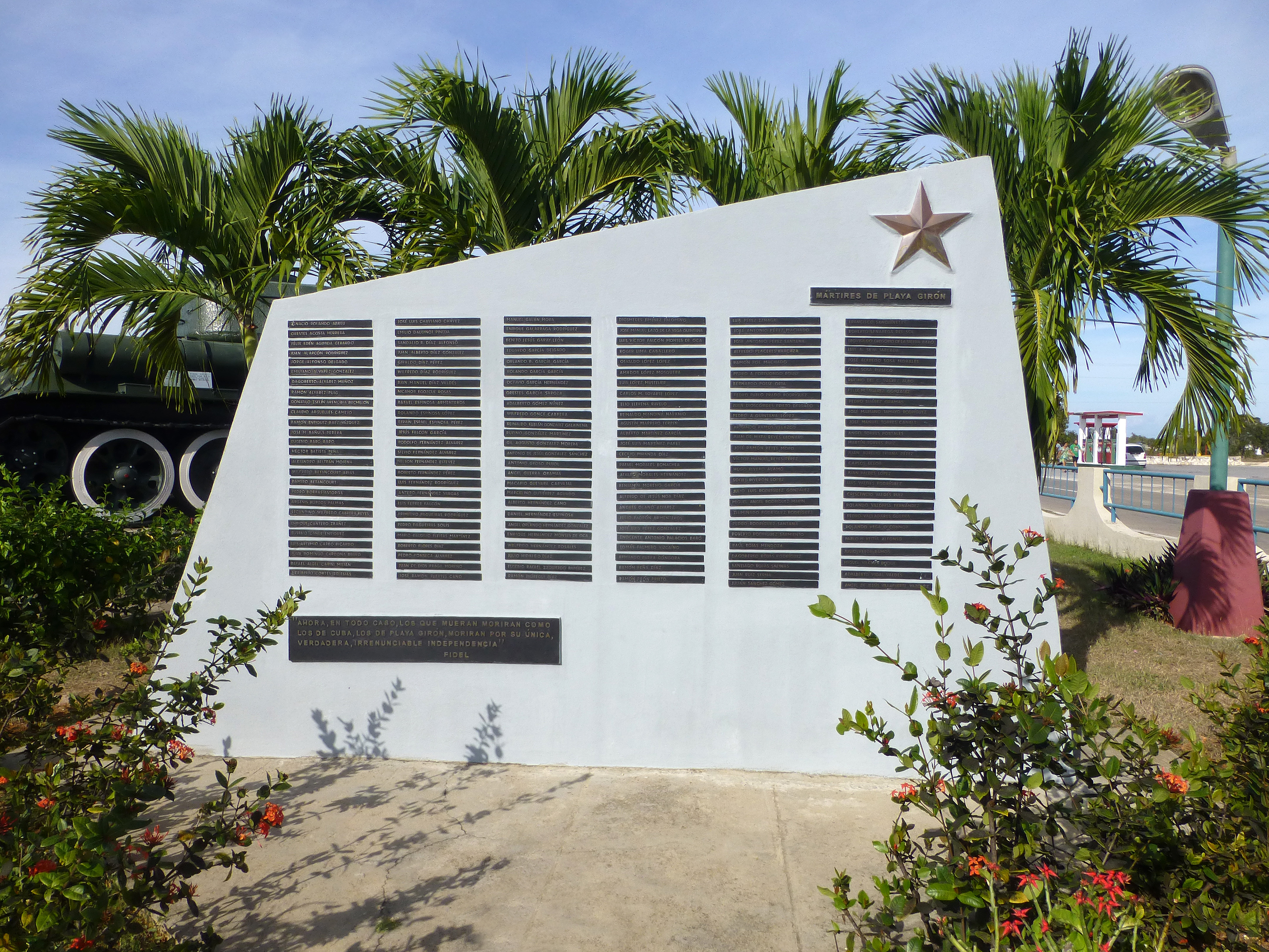 Museo Girón à Playa Girón (Cuba)